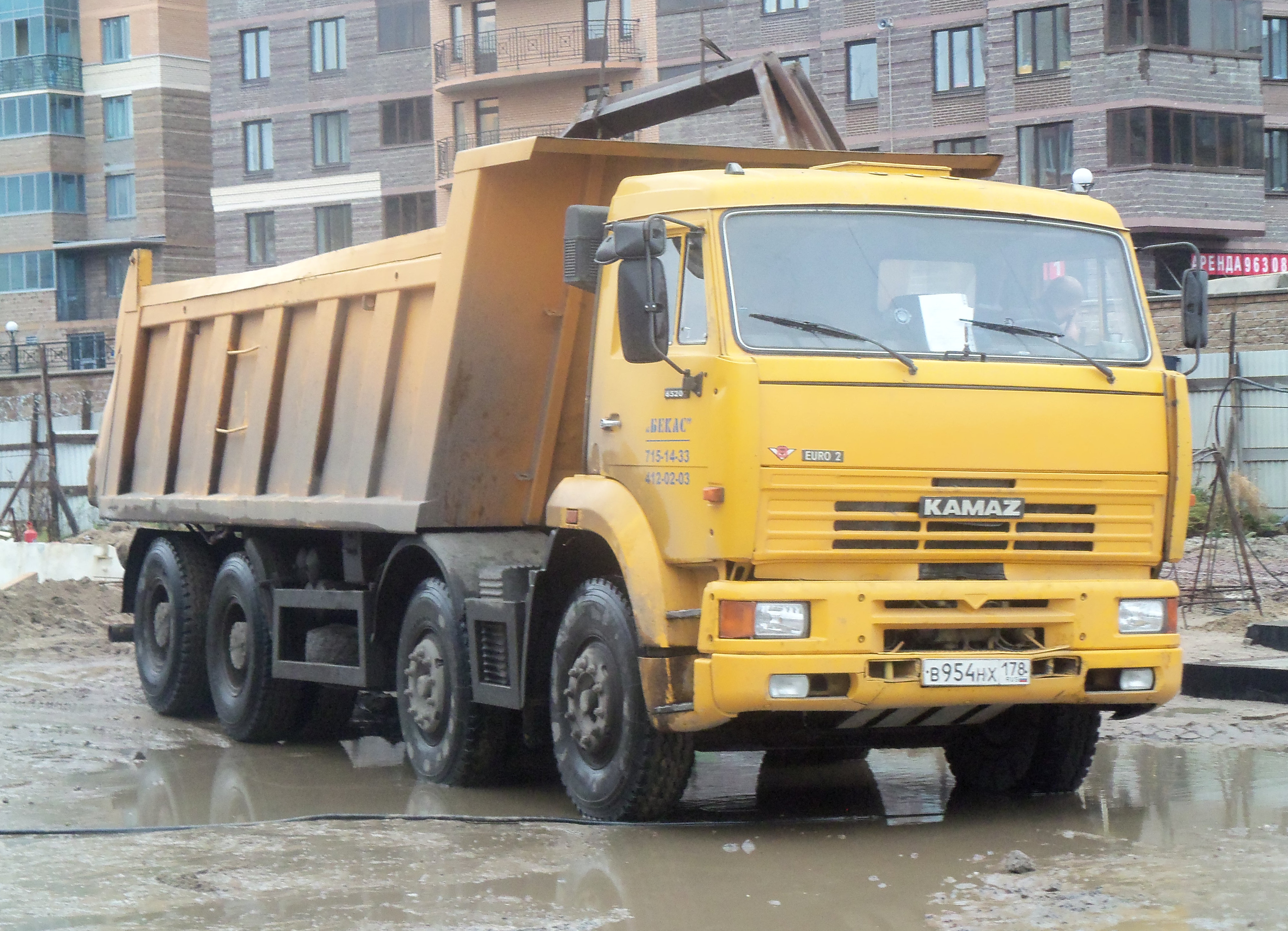 Четырёхосный самосвал на стройке у перекрёстка улиц Верности и Бутлерова